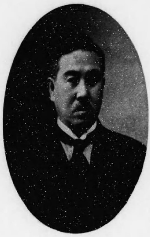 十代吉野周太郎（1871～1937）